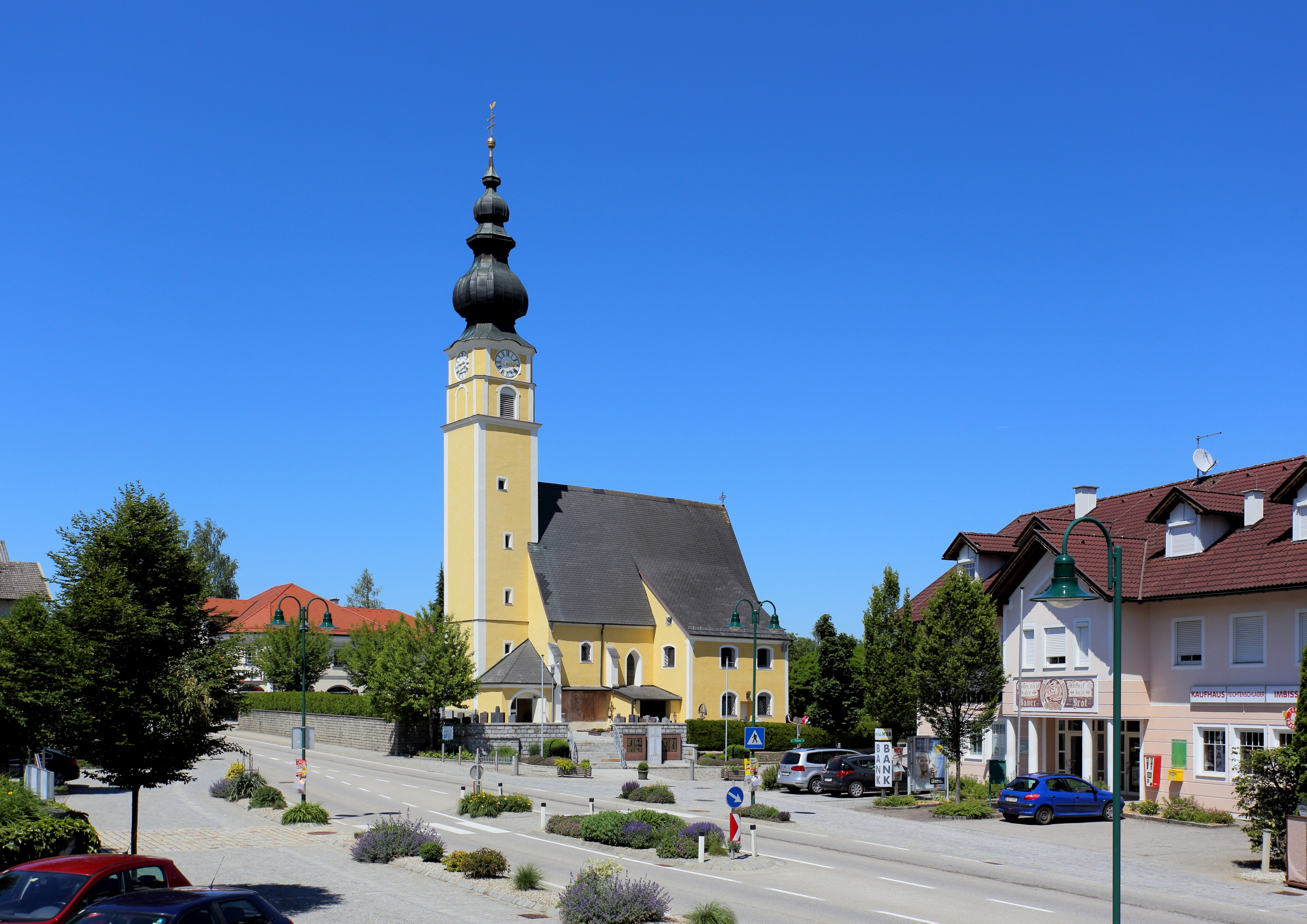 Südansicht des Dorfplatzes mit der katholischen Pfarrkirche hl. Petrus der oberösterreichischen Gemeinde Moosbach. Ein gotischer Sakralbau mit einer vorwiegend neogotischer Einrichtung aus den Jahren 1902 bis 1906. Der Westturm wurde 1766 erhöht und eine barocke Zwiebelhaube aufgesetzt.